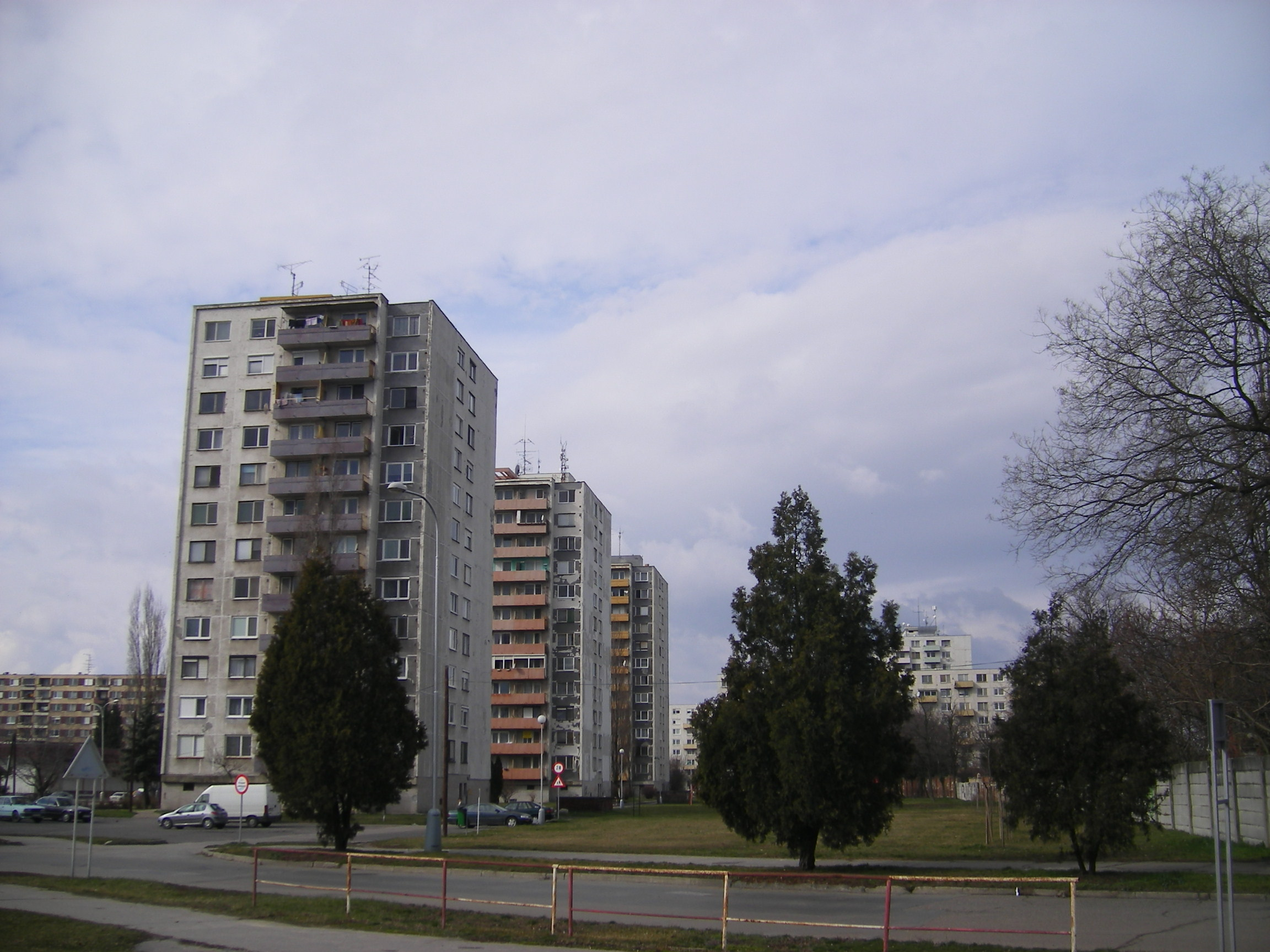 Sídliště VII. na ulici Eötvöse v západní části Komárna